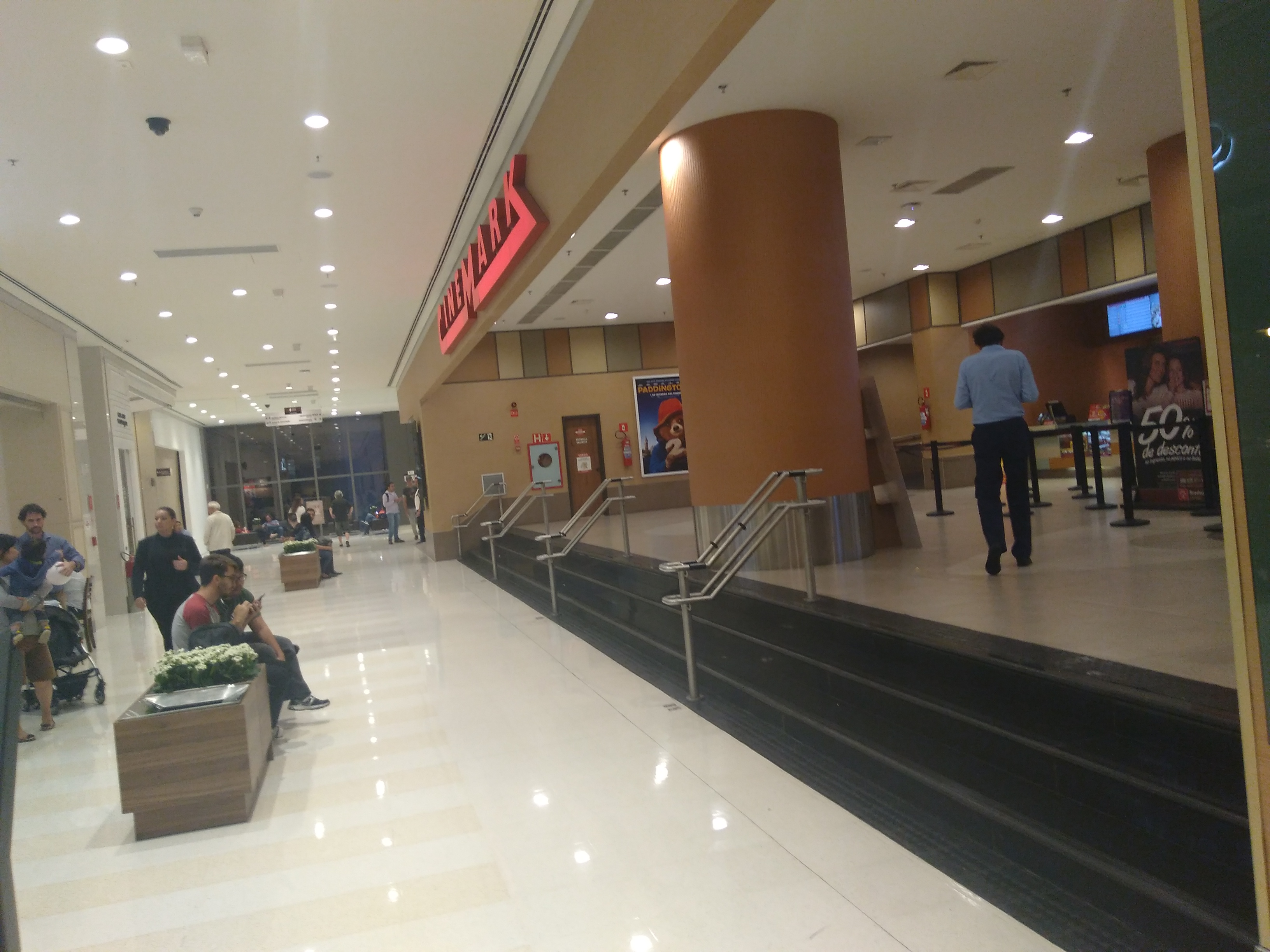 Vista lateral da entrada do Cinemark Cidade São Paulo